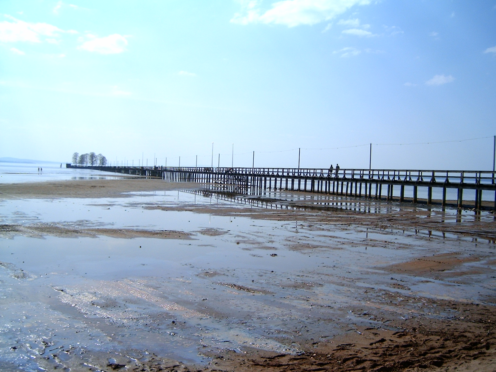 Långbryggan i Rättvik (Long pier in Rättvik, Sweden.)